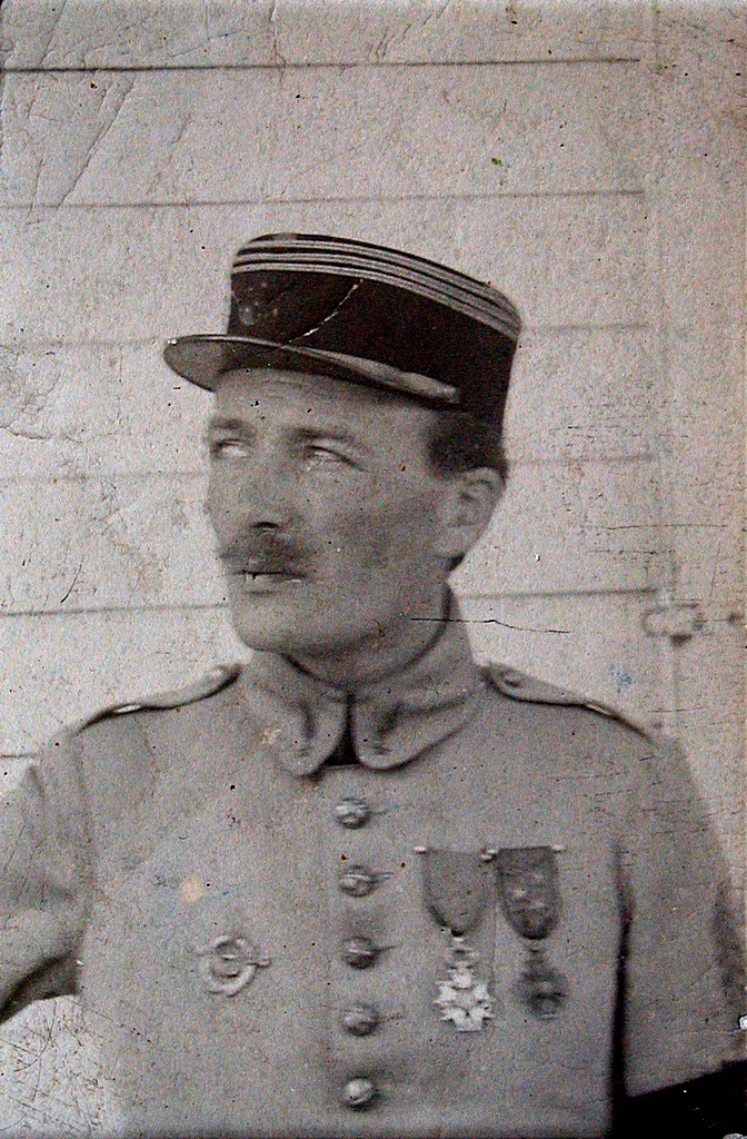 Portrait